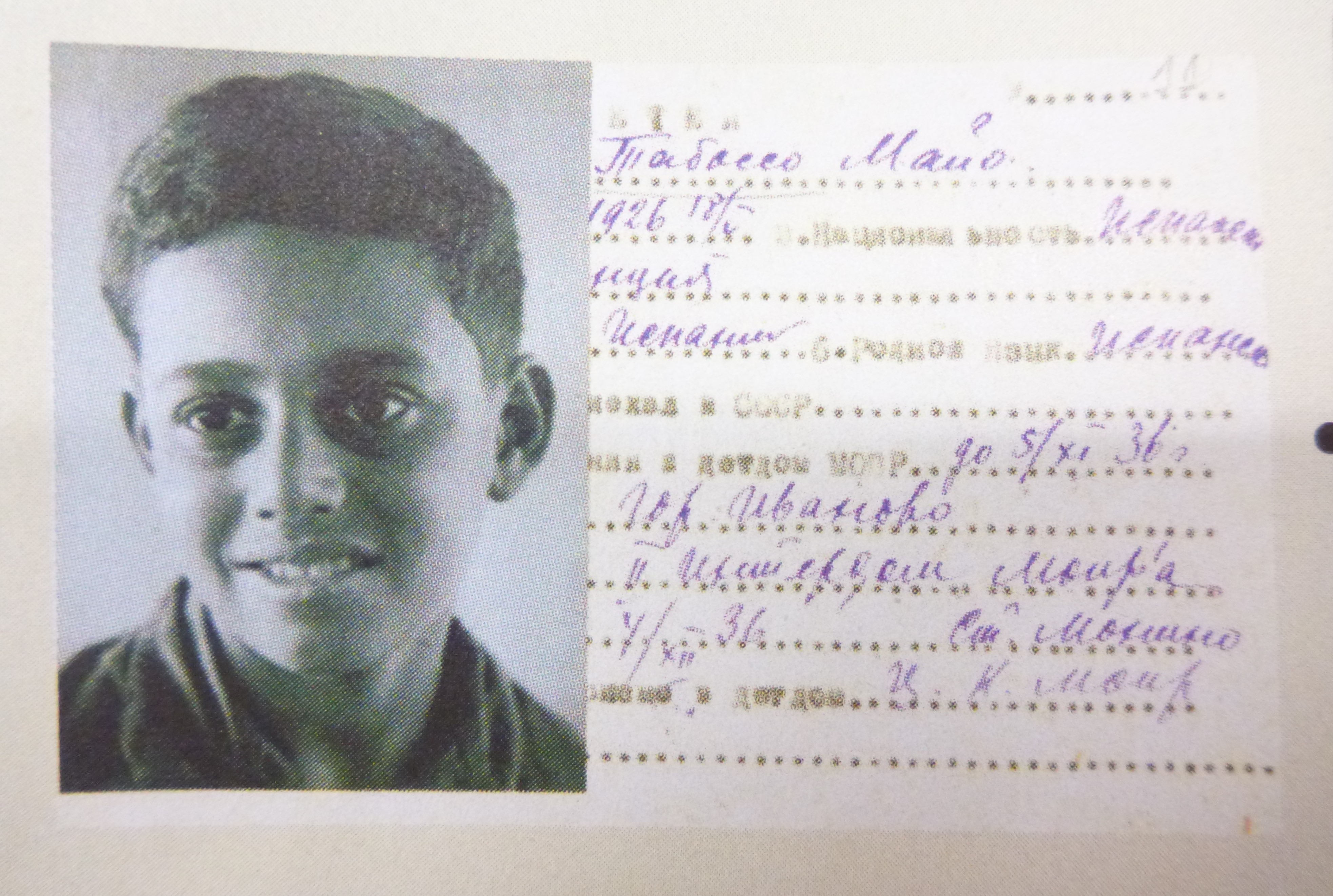 Учетная карточка испанца воспитанника МОБР Табоссо Майо Дилетант 2019 год номер 48 страница 65